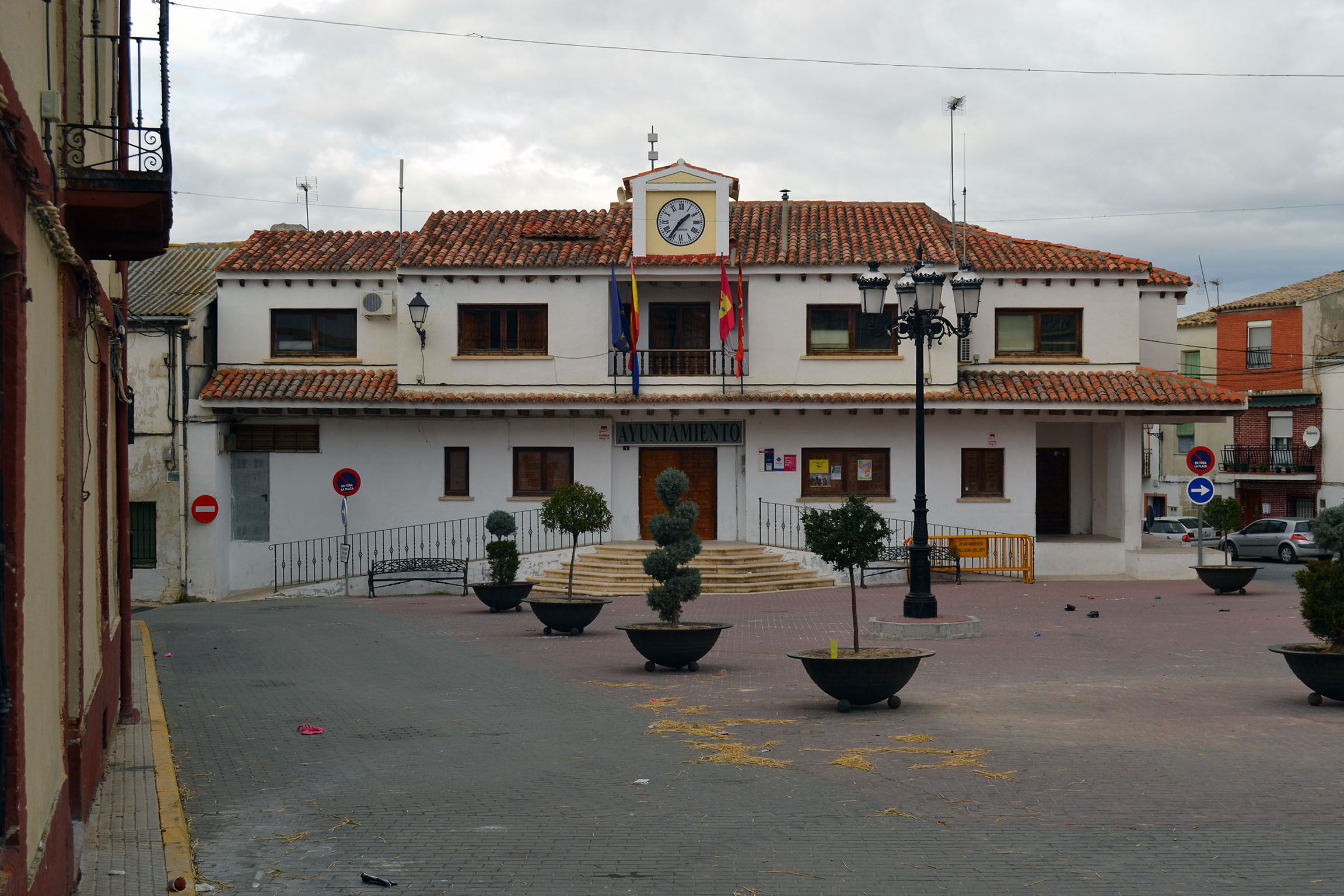 Ayuntamiento de Villalba del Rey (Cuenca)